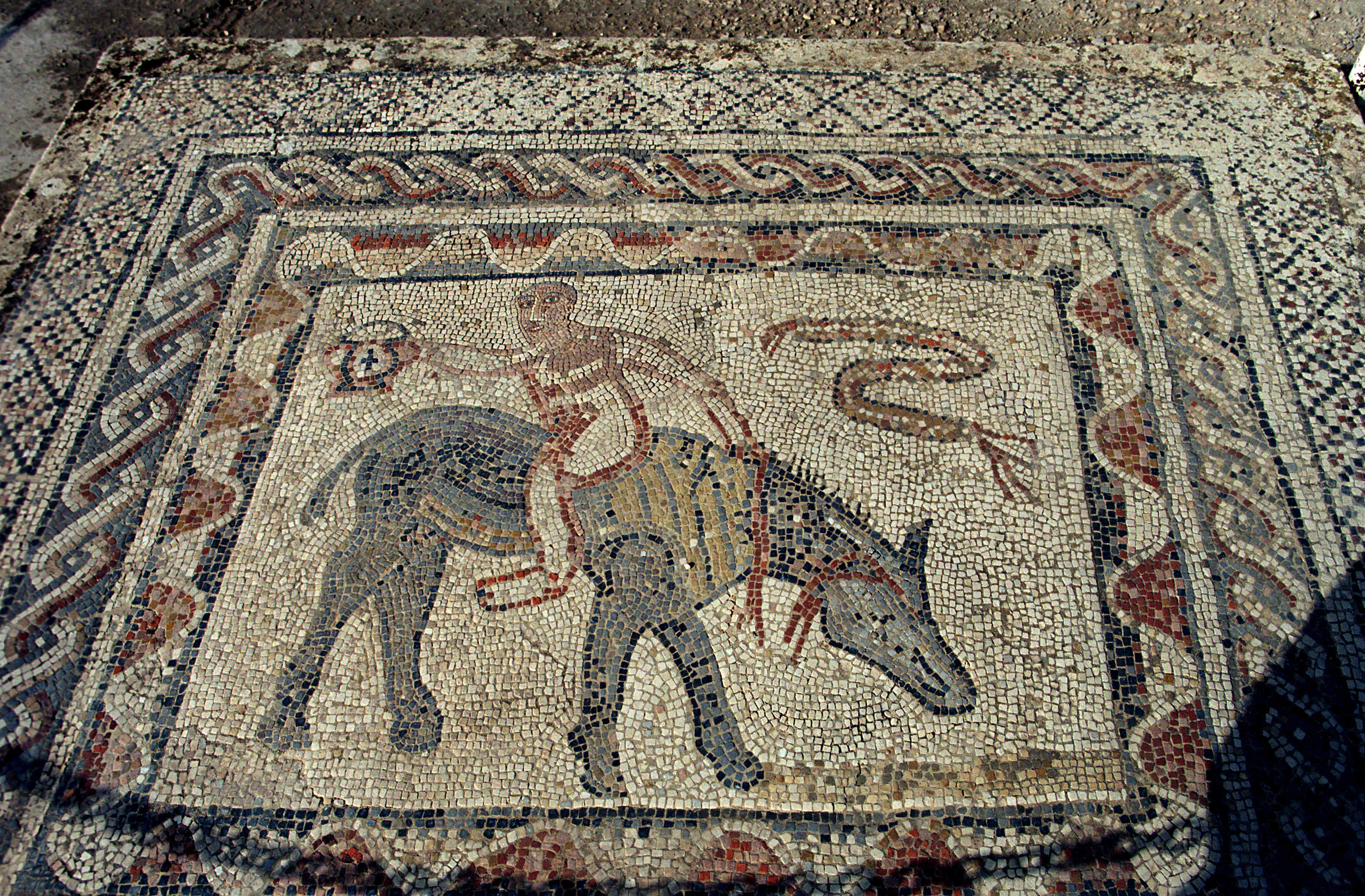 Volubilis, Morocco